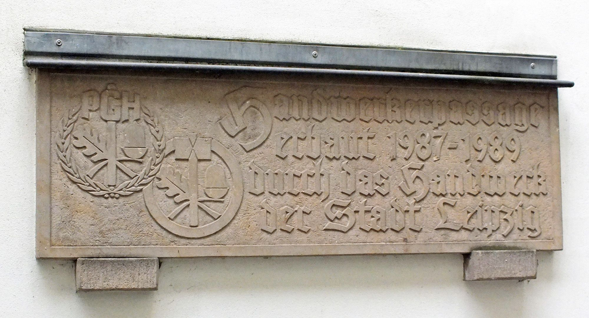 Hinweistafel in der Handwerkerpassage in Leipzig